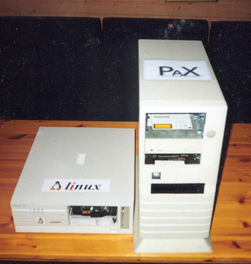 Serverne som ble brukt paa TCP99 til og med TCP 6.